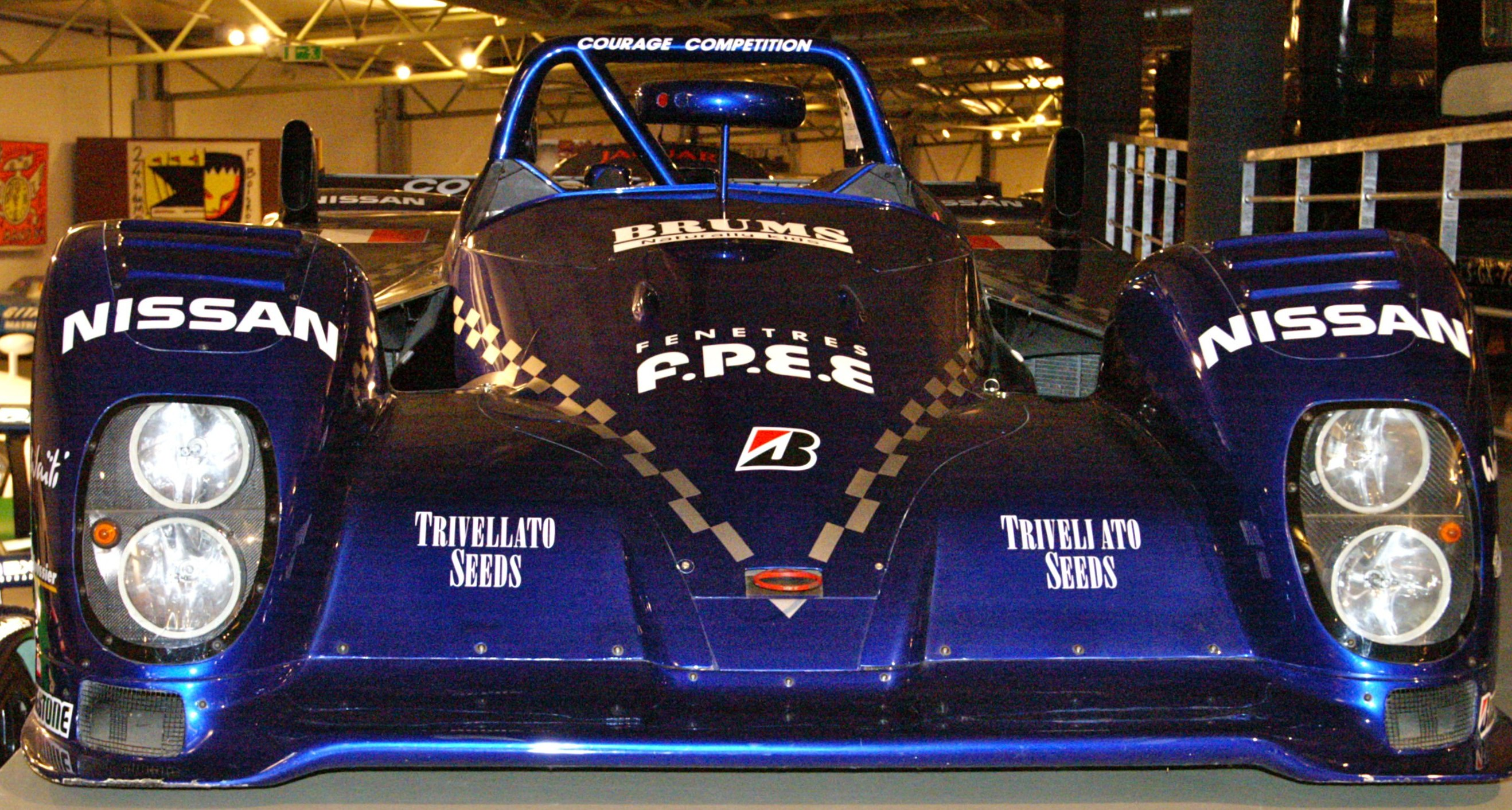 Le Musee des 24 Heures 6th @ le Mans 1999